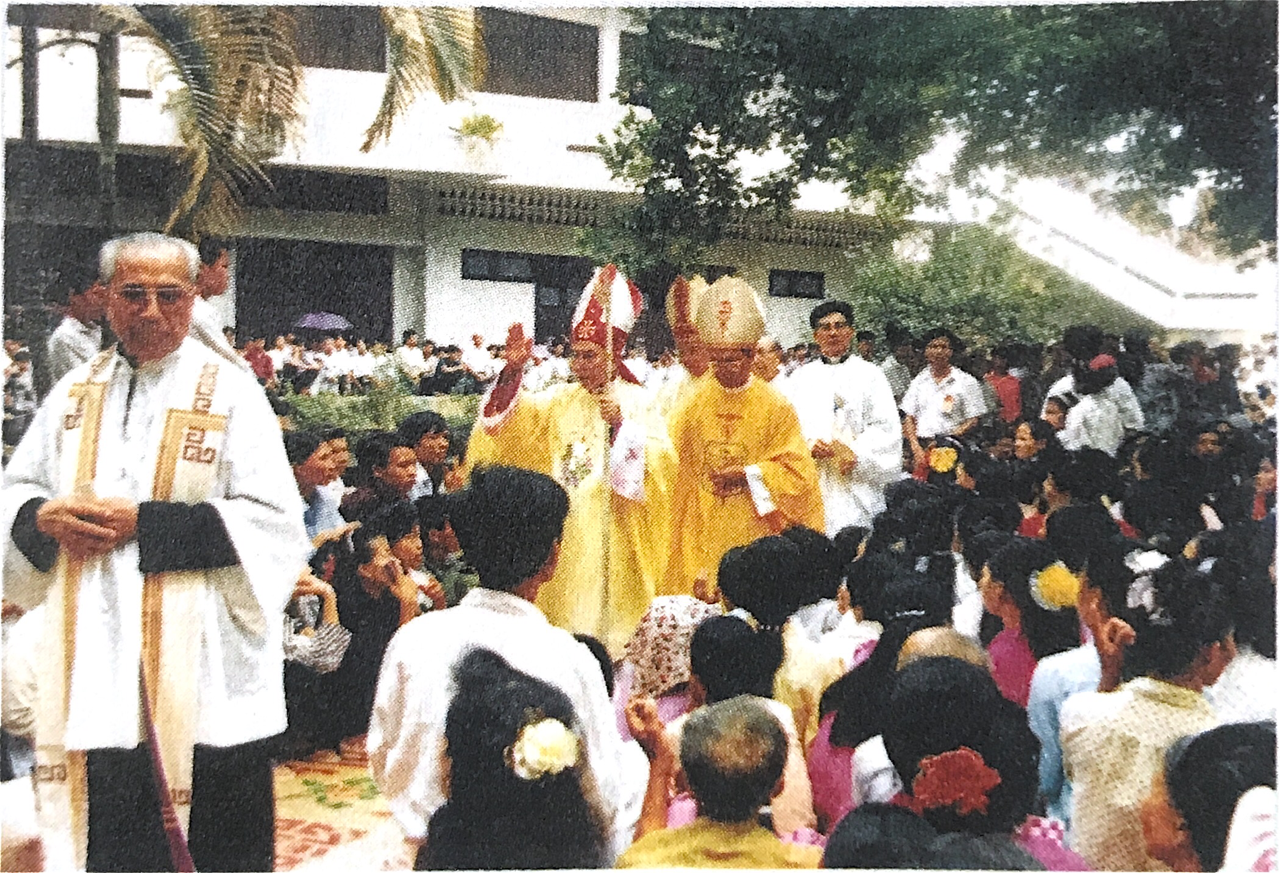 Thánh lễ tấn phong Giám mục cho Đức Cha Phaolô Lê Đắc Trọng 15-08-1994